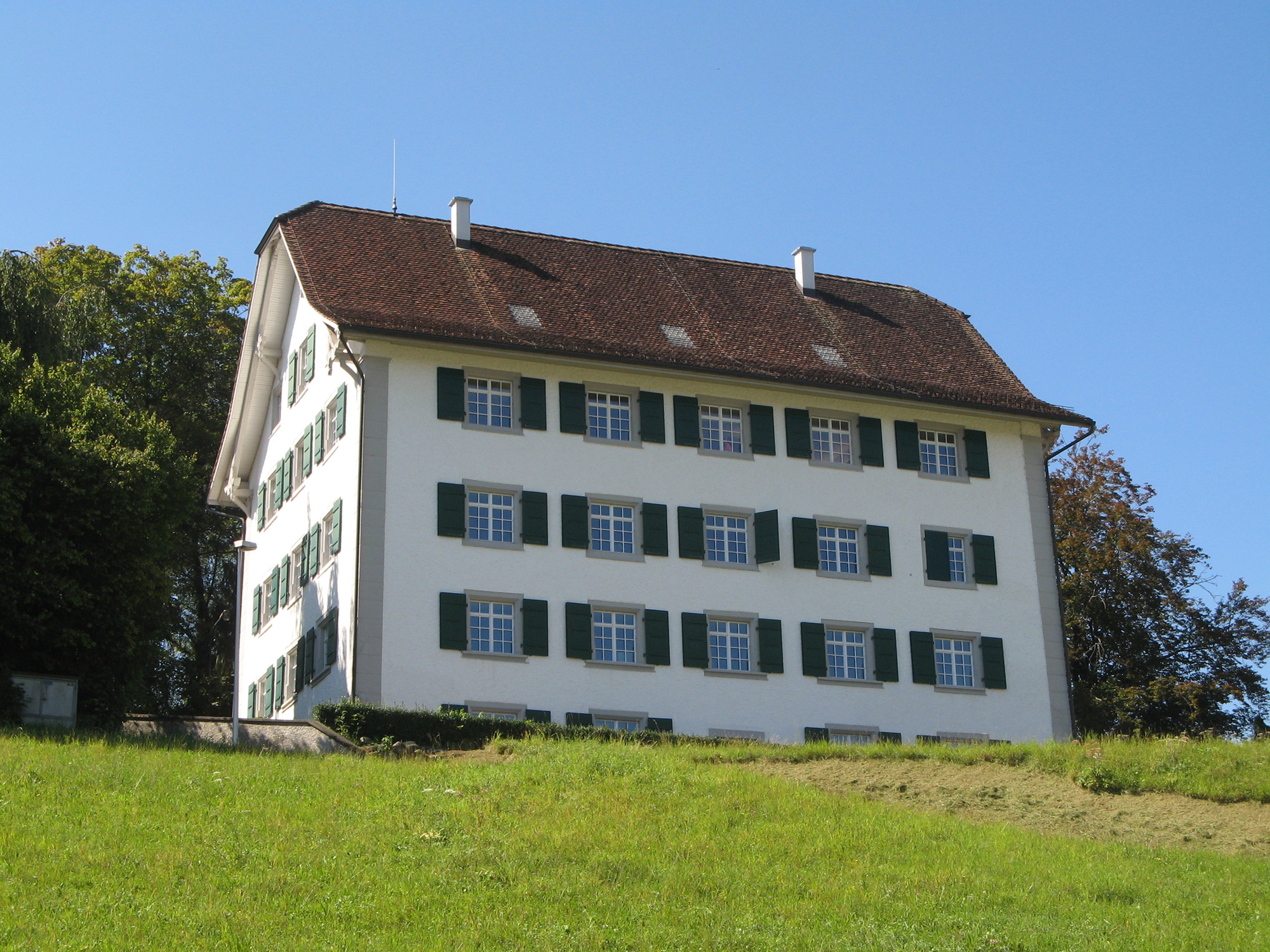 Amtshaus (mit Polizeiposten) in Muri